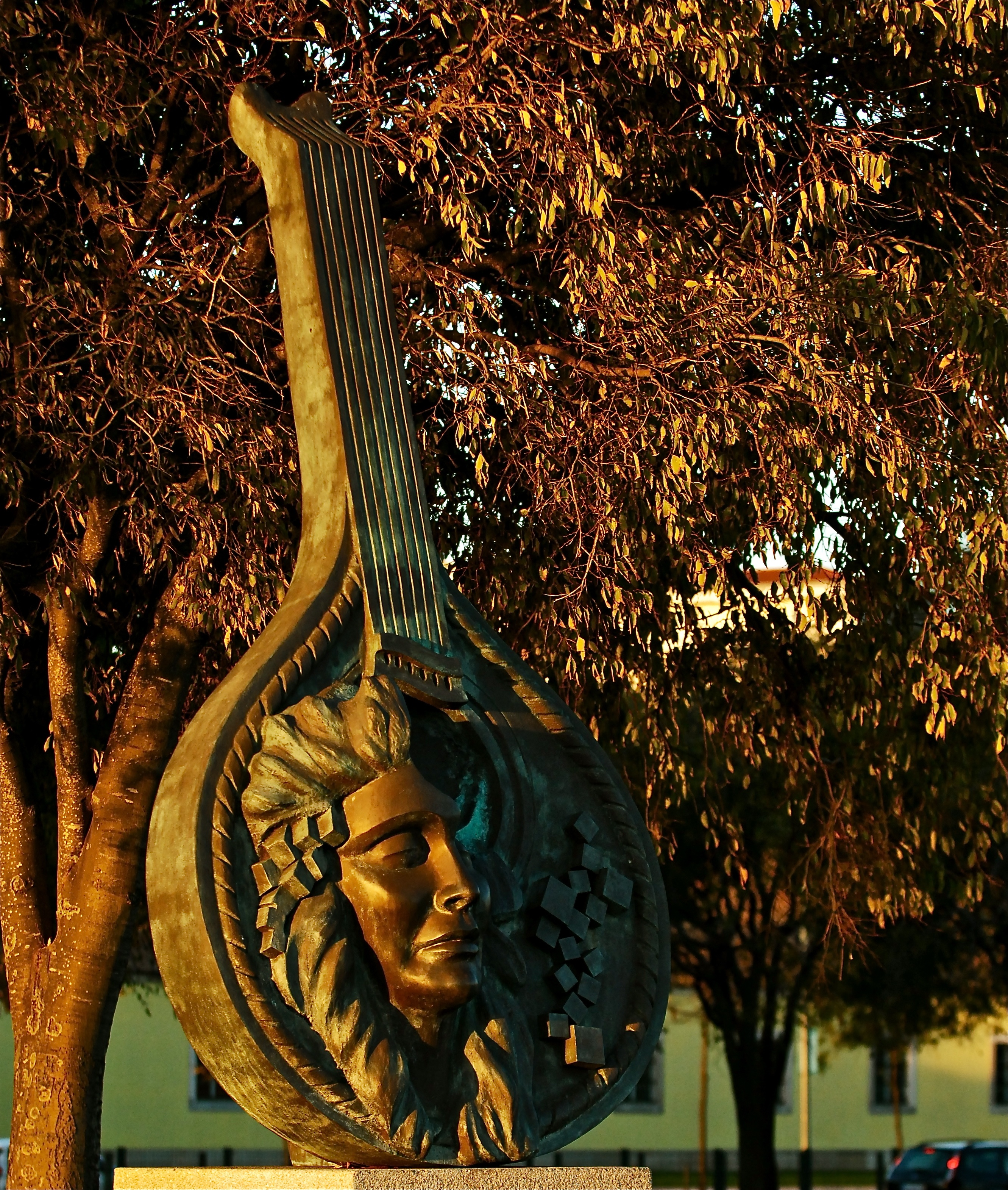 "Guitarra na Proa", homenagem ao Fado, a Amália e a Lisboa; escultura de Domingos de Oliveira. Em Portugal, Lisboa, Santa Maria de Belém.